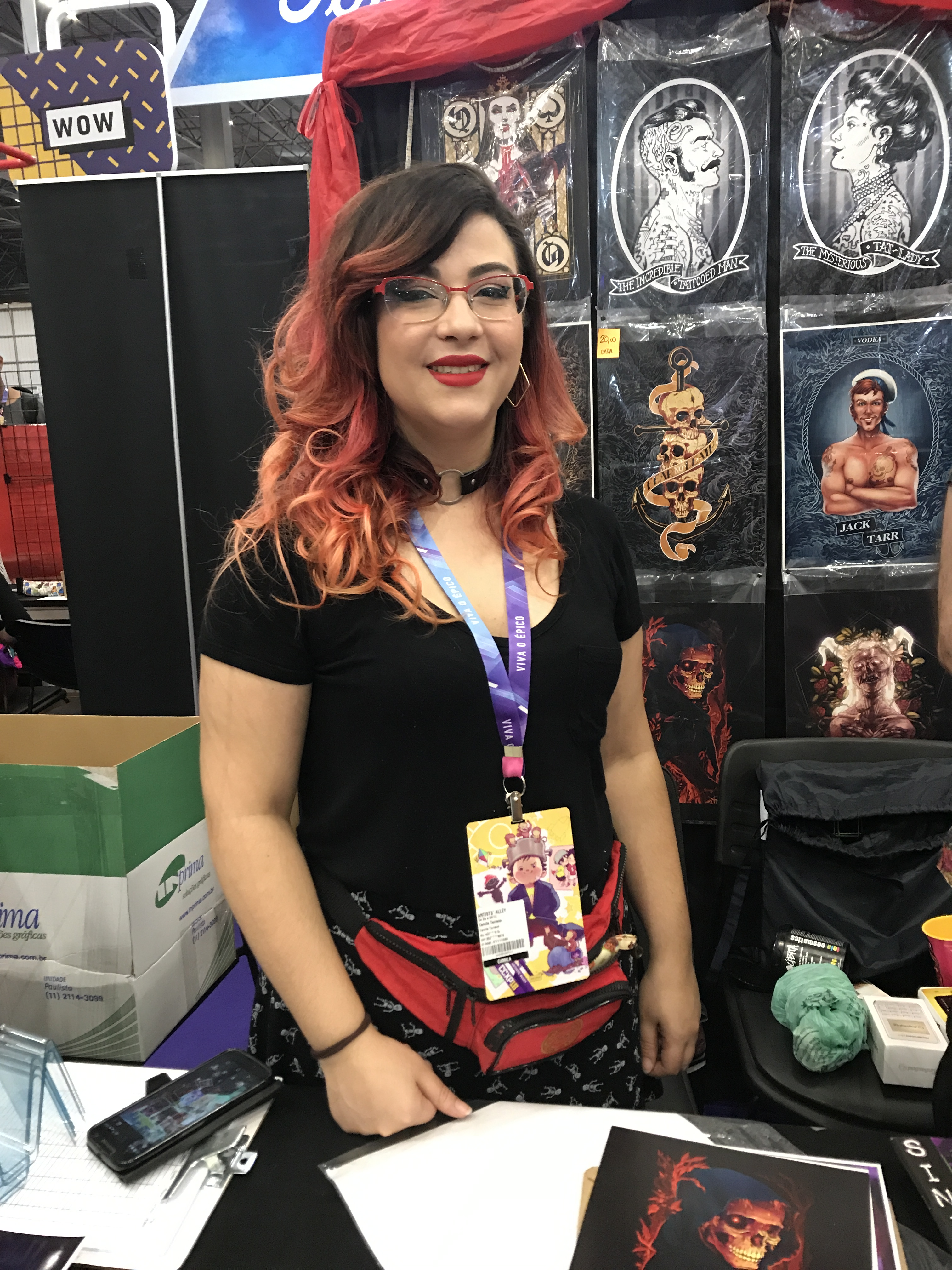 Artista Camila Torrano na edição de 2018 da Comic Con Experience.